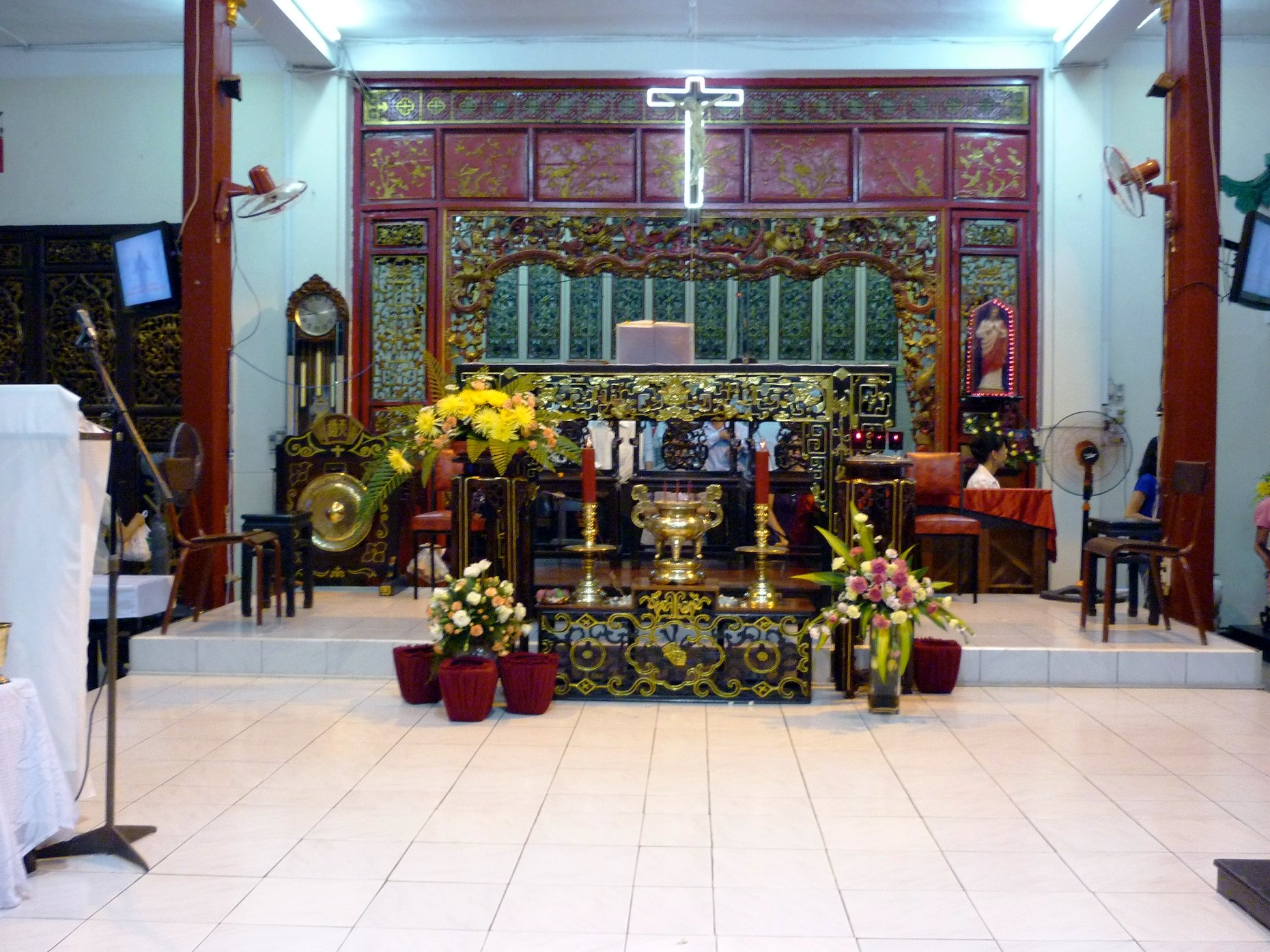 Cung Thánh nhà thờ Đức Bà Hòa Bình, quận 1, thành phố Hồ Chí Minh